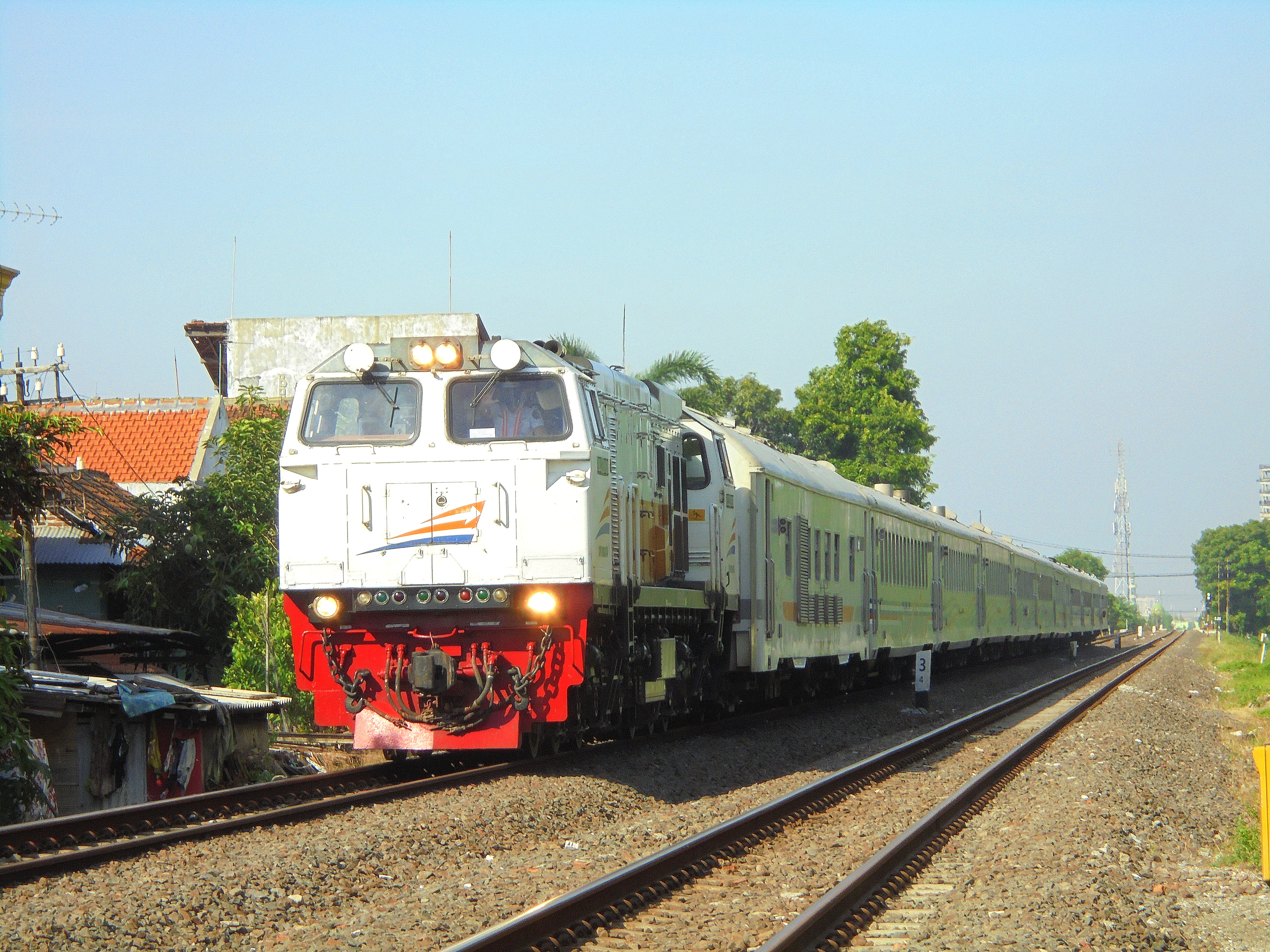 Kereta api Dhoho saat akan tiba di Stasiun Surabaya Gubeng, 2020